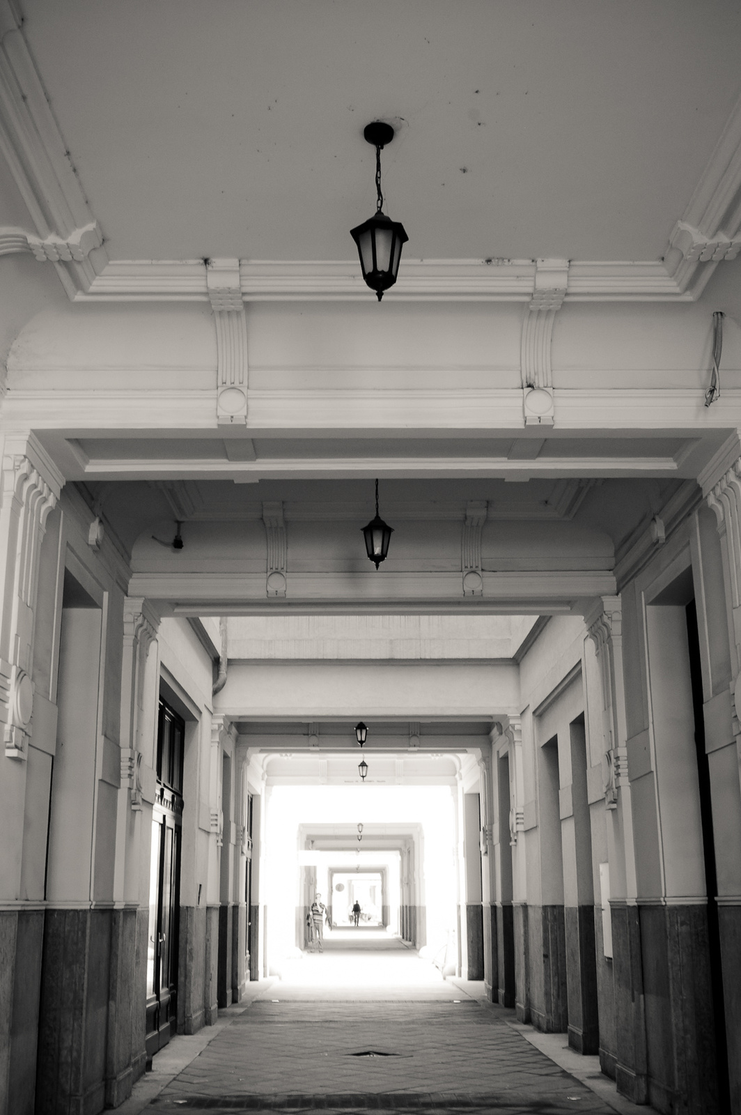 Gozsdu-udvar (Budapest 7, Király utca 13., Dob utca 16.)